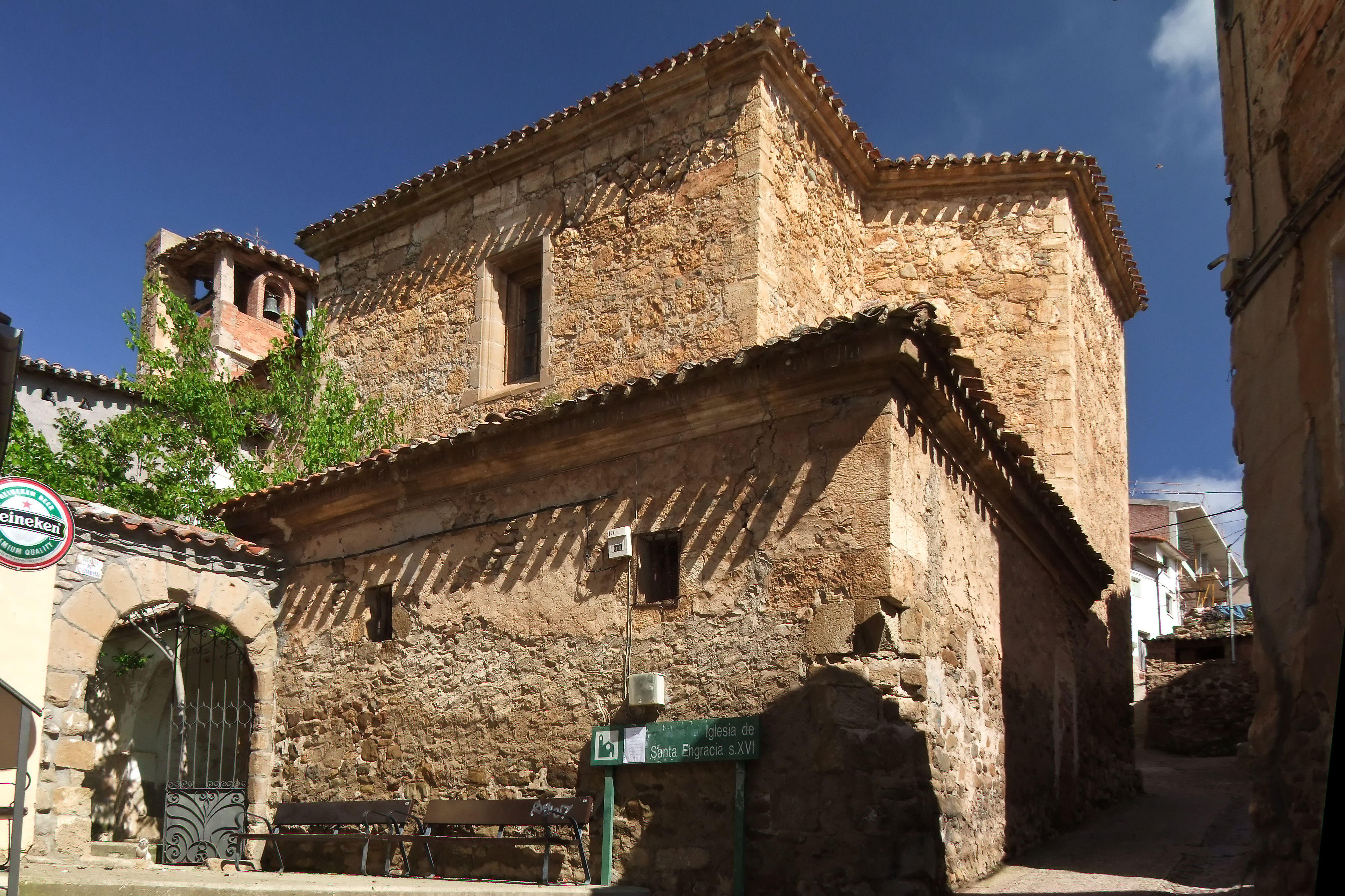 Iglesia de Santa Engracia. s XVI en la localidad de Santa Engracia de Jubera, La Rioja - España